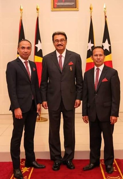 Drei frisch vereidigte Botschafter Osttimors (von links: Isílio Coelho, Olímpio Branco und Lisualdo Gaspar